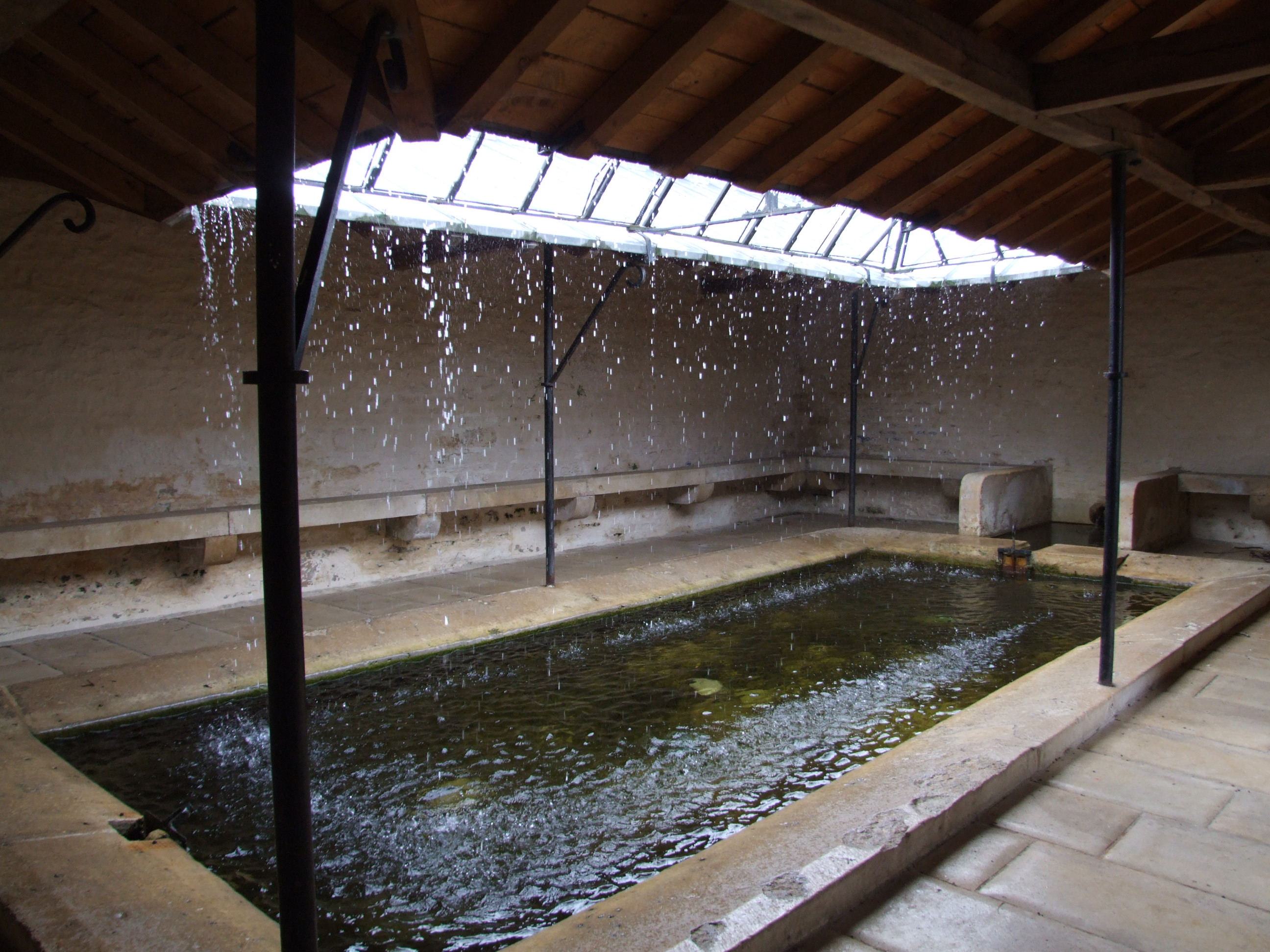 Lavoir de Baigneux-les-Juifs, Côte-d'Or, Bourgogne, FRANCE